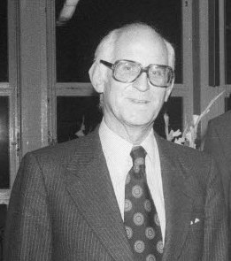 im Hygiene-Institut der Christian-Albrechts-Universität (CAU). Im Bild v.l.n.r.: Vorsitzender des Kuratoriums der Feldberg-Stiftung Prof. Dr. Robert Stämpfli, Immunologe Prof. Dr. Gowans, CAU-Präsident Prof. Dr. Gerd Griesser und Immunologe an der CAU Prof. Dr. Wolfgang Müller-Ruchholtz.